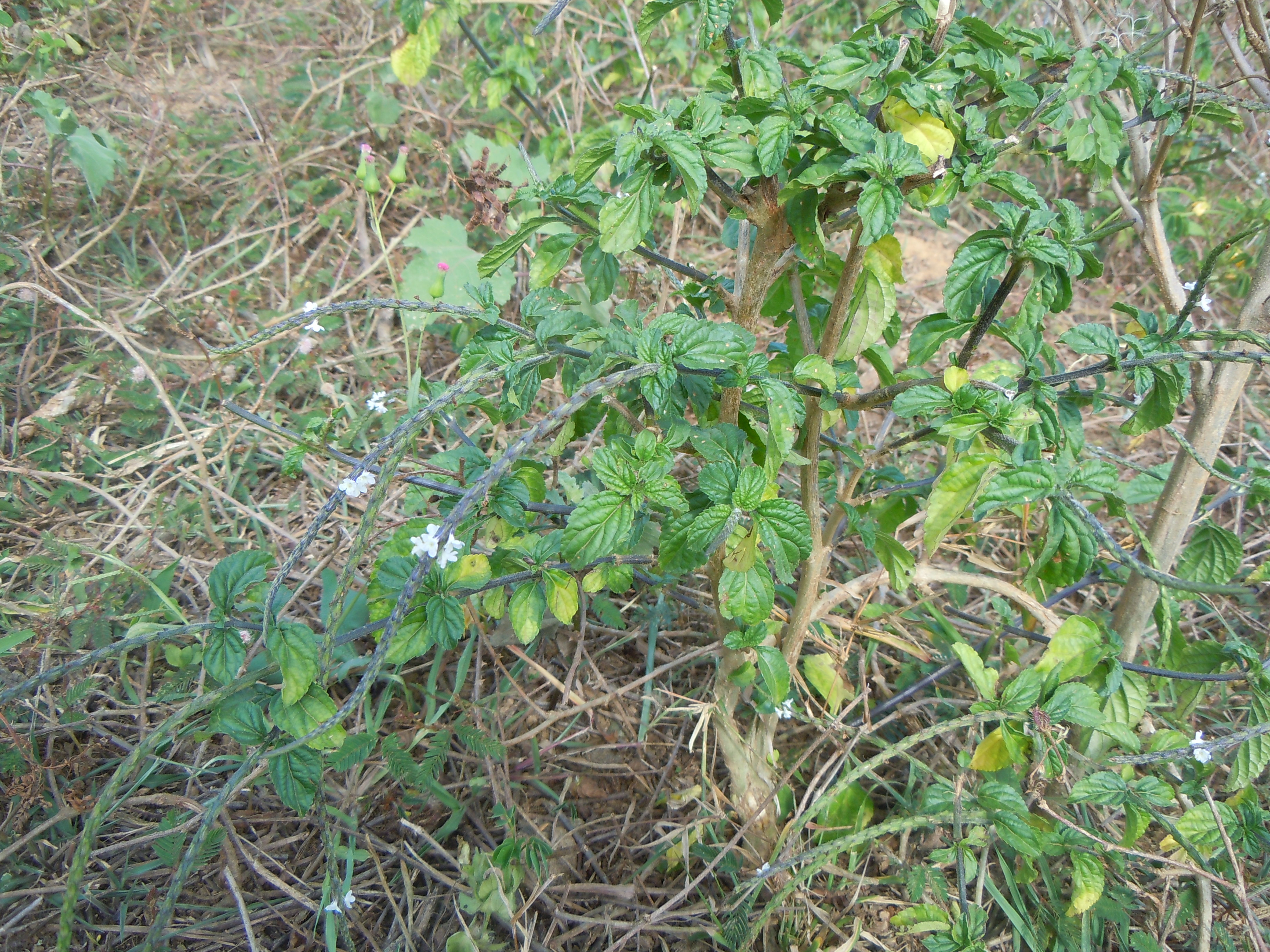 Stachytarpheta fruticosa - Vinales Infloresence